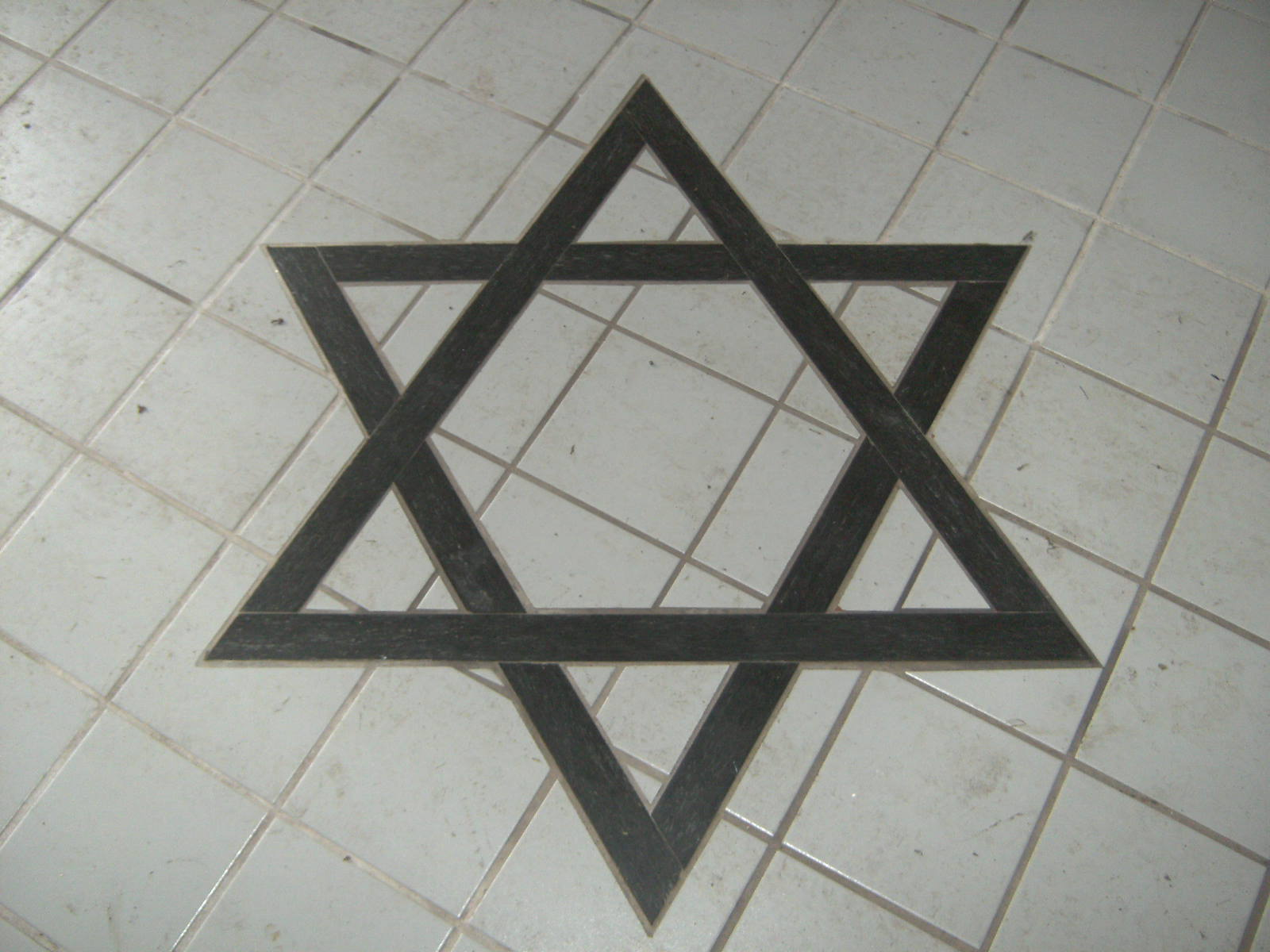 Davidster verwerkt in de vloer van de entree van het metaheerhuis op de Joodse begraafplaats te Deventer